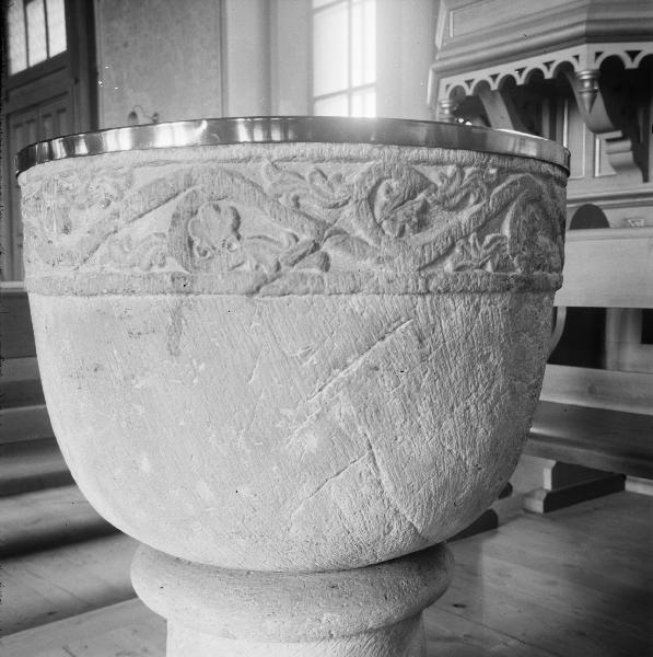 Dopfunt, sandsten, 1200-talet, detalj av cuppan. Kategori: (04) DopfuntarDopfunt, sandsten, 1200-talet, detalj av cuppan.